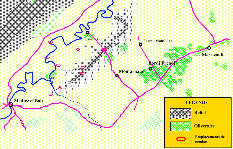 Zone des combats de la Phalange Africaine en Tunisie pendant la seconde guerre mondiale.